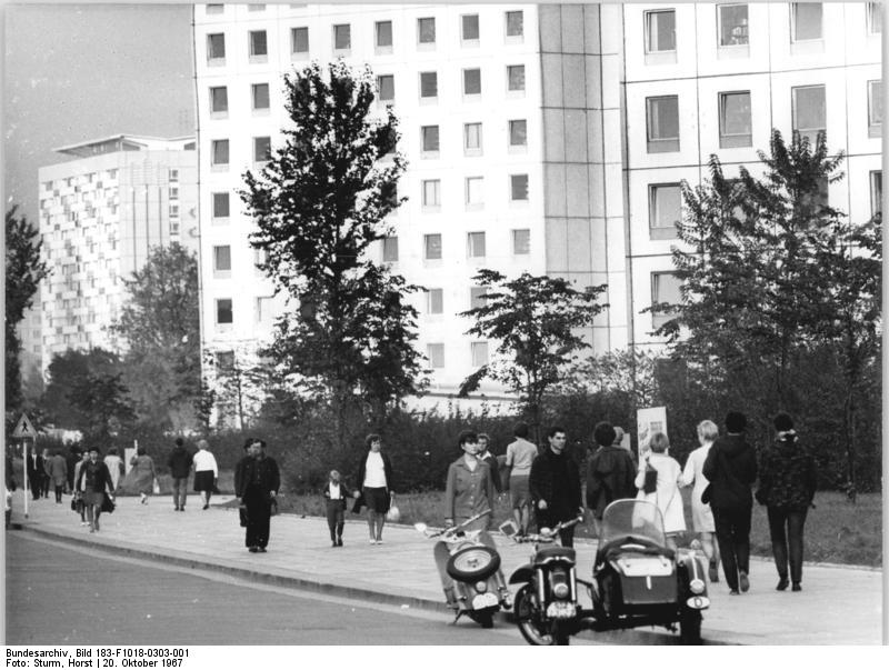 Zentralbild-Sturm hsch 20.10.67 Dresden (DDR) : Studentenwohnblocks an der Prager Straße In diesen Neubaublocks an der Prager Straße wohnen Studenten der Technischen Hochschule Dresden. Etwa die Hälfte der Direktstudenten der TH sind in universitätseigenen Wohnheimen untergebracht.